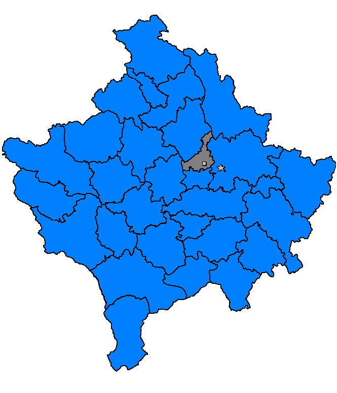 Obiliq, Kosovë 2006